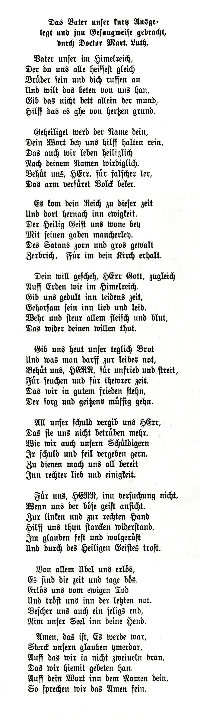 Martin Luther: Vater unser im Himmelreich, Urtext nach WA 35